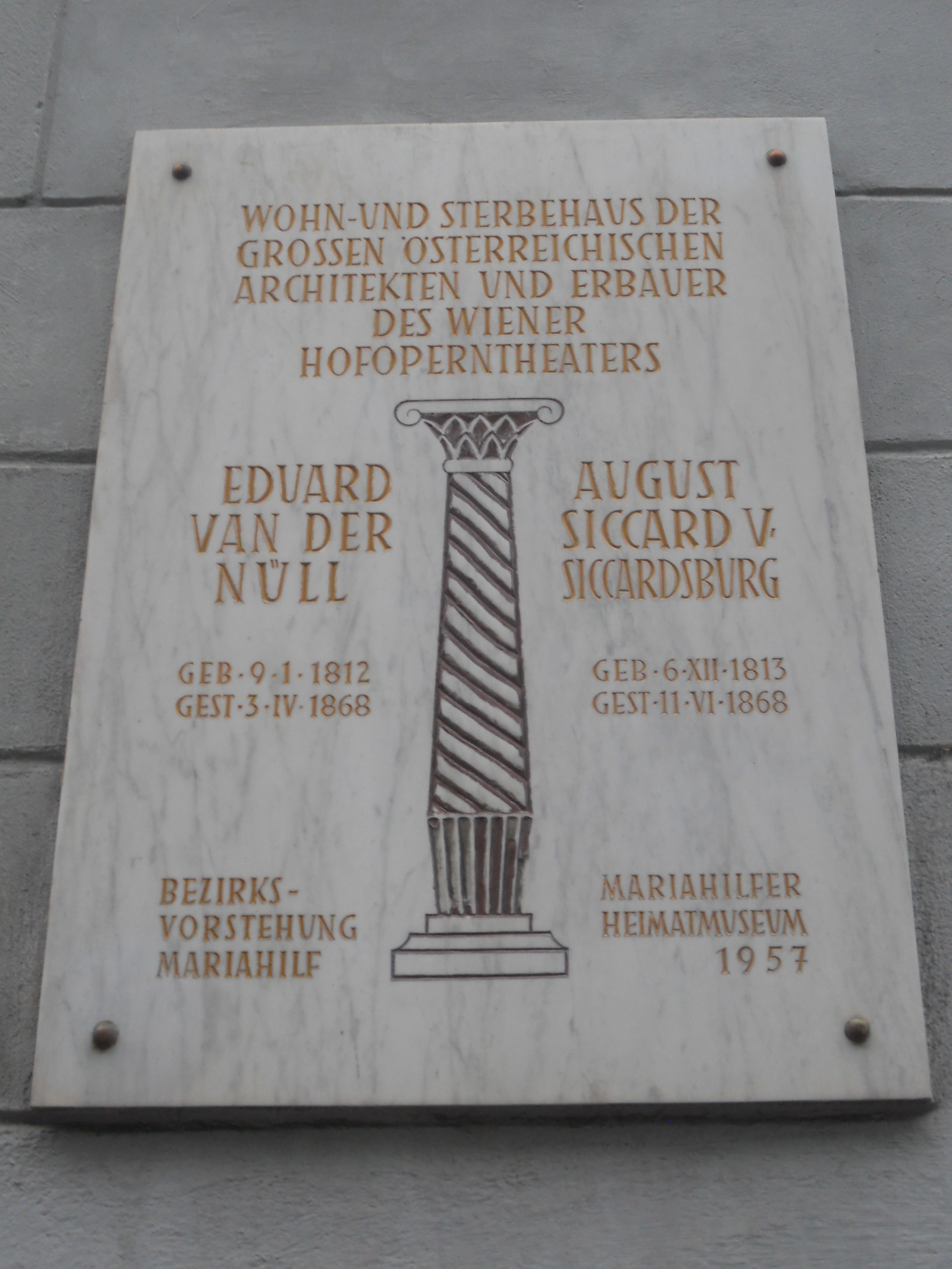 Gedenktafel am Haus Schadekgasse 4 in Wien für Sicardsburg und van der Nüll